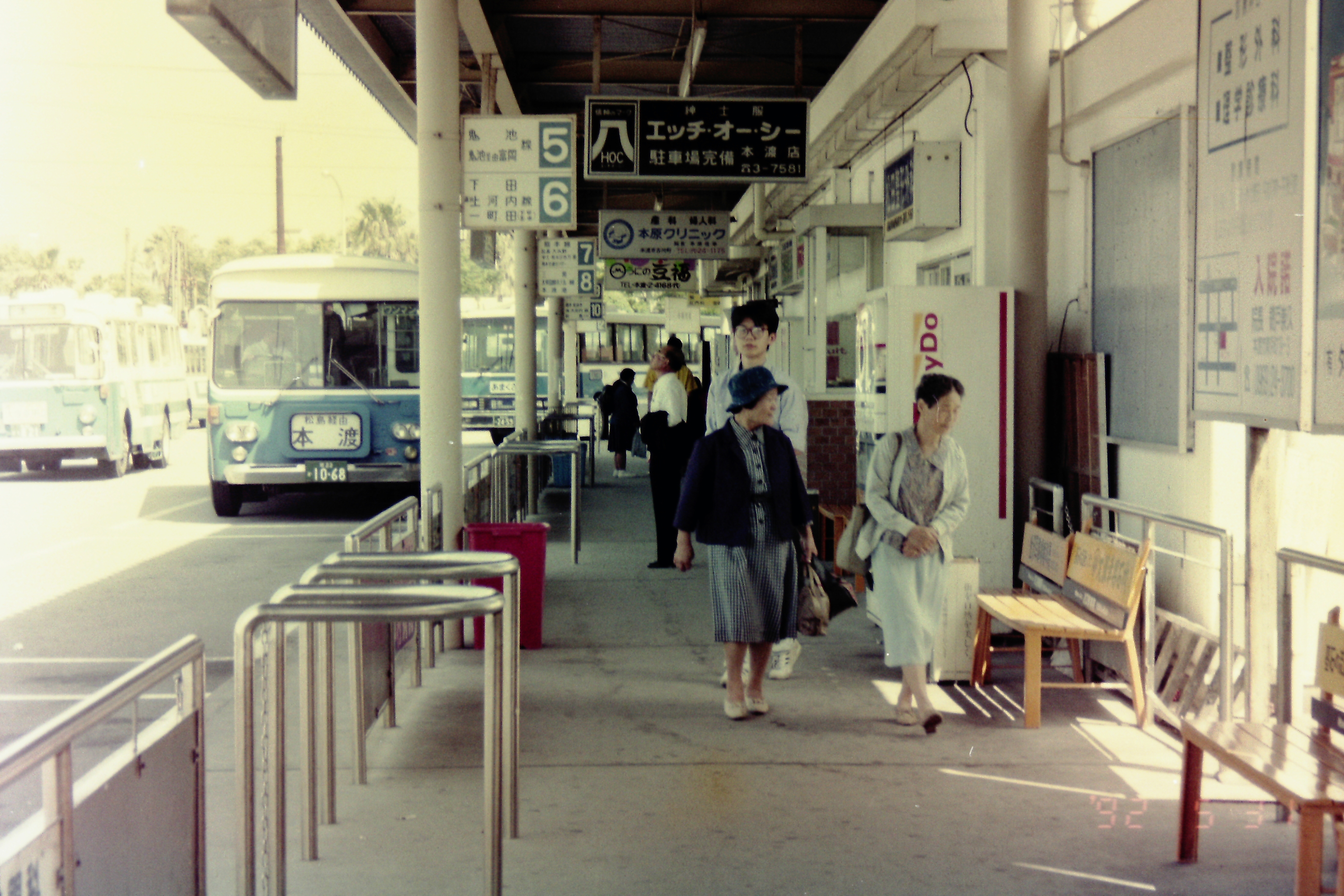 6ブースあった頃の構内